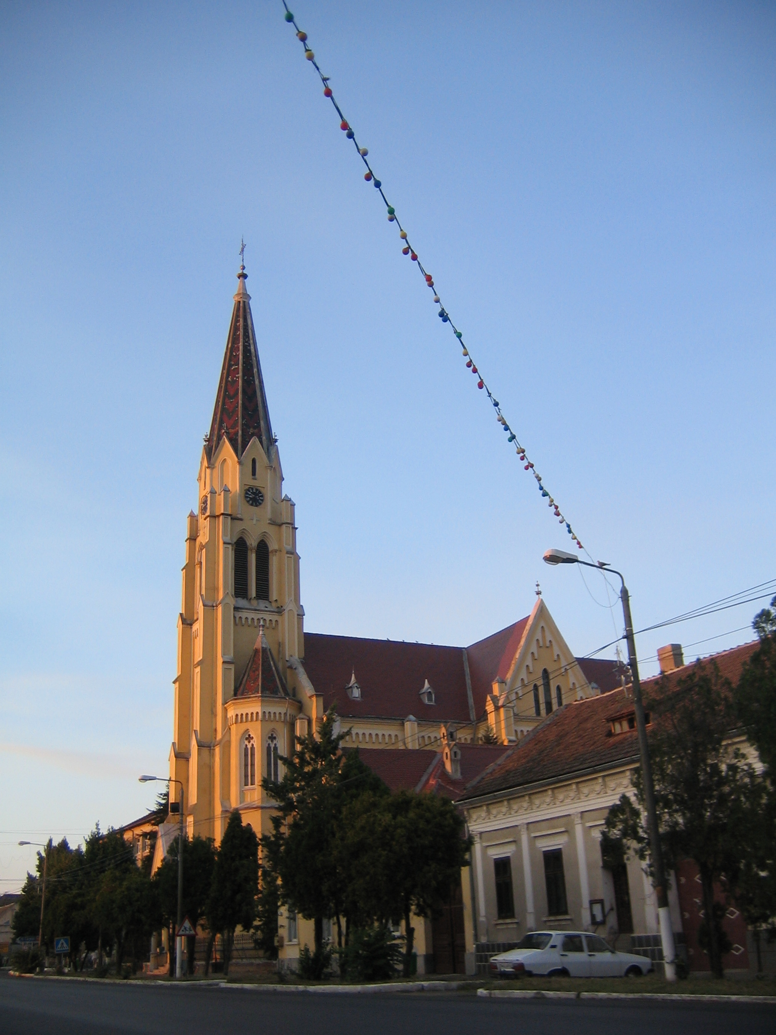 Deta church